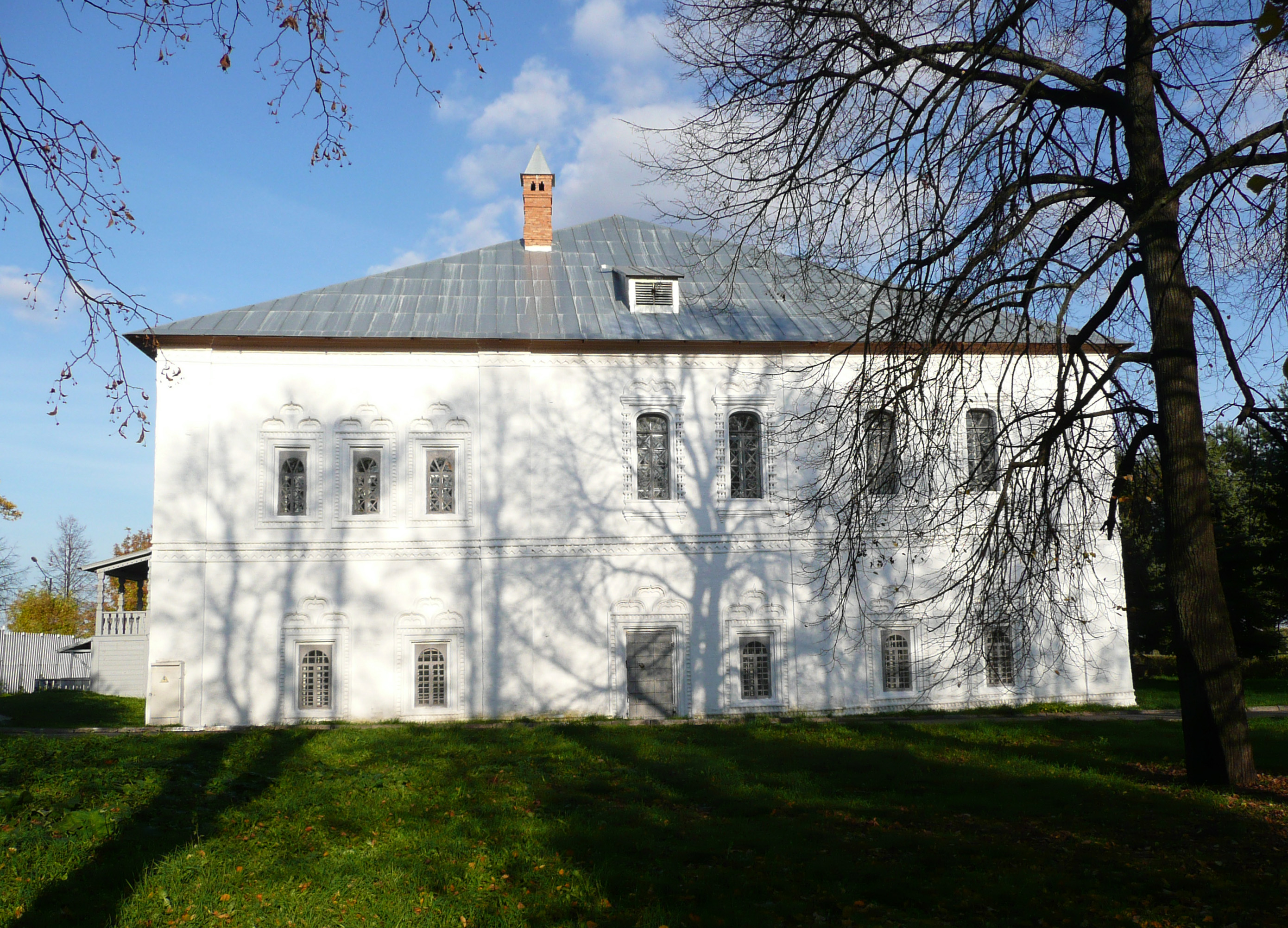 Metropolitan's Palace in Yaroslavl